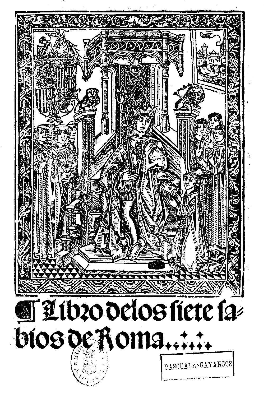 Libro de los engaños Título: Libro de los siete sabios de Roma Autor: Fecha: 1530 Datos de edición: Impresso enla ... ciudad de Burgos por Juan de Junta ...